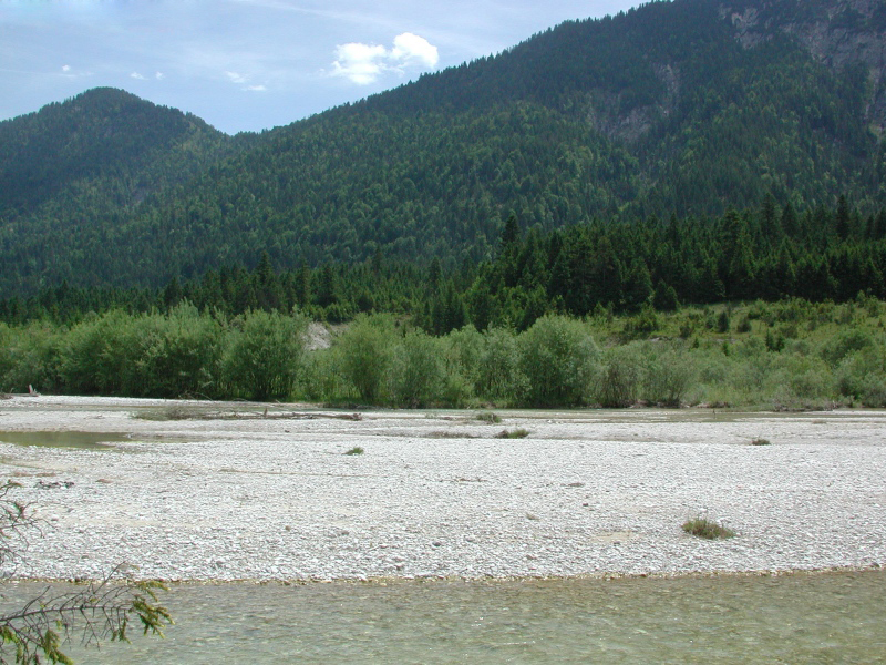 Lebensraum von Arctosa cinerea, Kiesbänke und -ufer in der Isar-Aue, Garmisch, Bayern, Deutschland